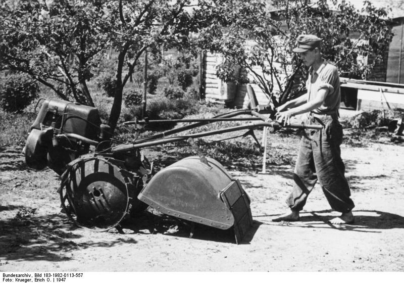 Illus / Erich O. Krueger Bodenfräse. Eine Kleinmaschine, die in der Kleinlandwirtschaft eine bedeutende Rolle in der Auflockerung des Bodens spielt. 456-47